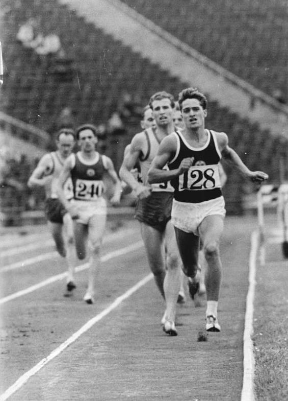 Jürgen Kühl, Manfred Matuschewski Zentralbild Dressel 25.7.1960 DDR-Leichtathletikmeisterschaften im Zentralstadion in Leipzig vom 22.-24.7.1960 UBz: Endkampf über 800 m der Herren. Im Vordergrund Jürgen Kühl (Nr. 128) . Mit Startnummer 240 der spätere Sieger Manfred Matuschewski.